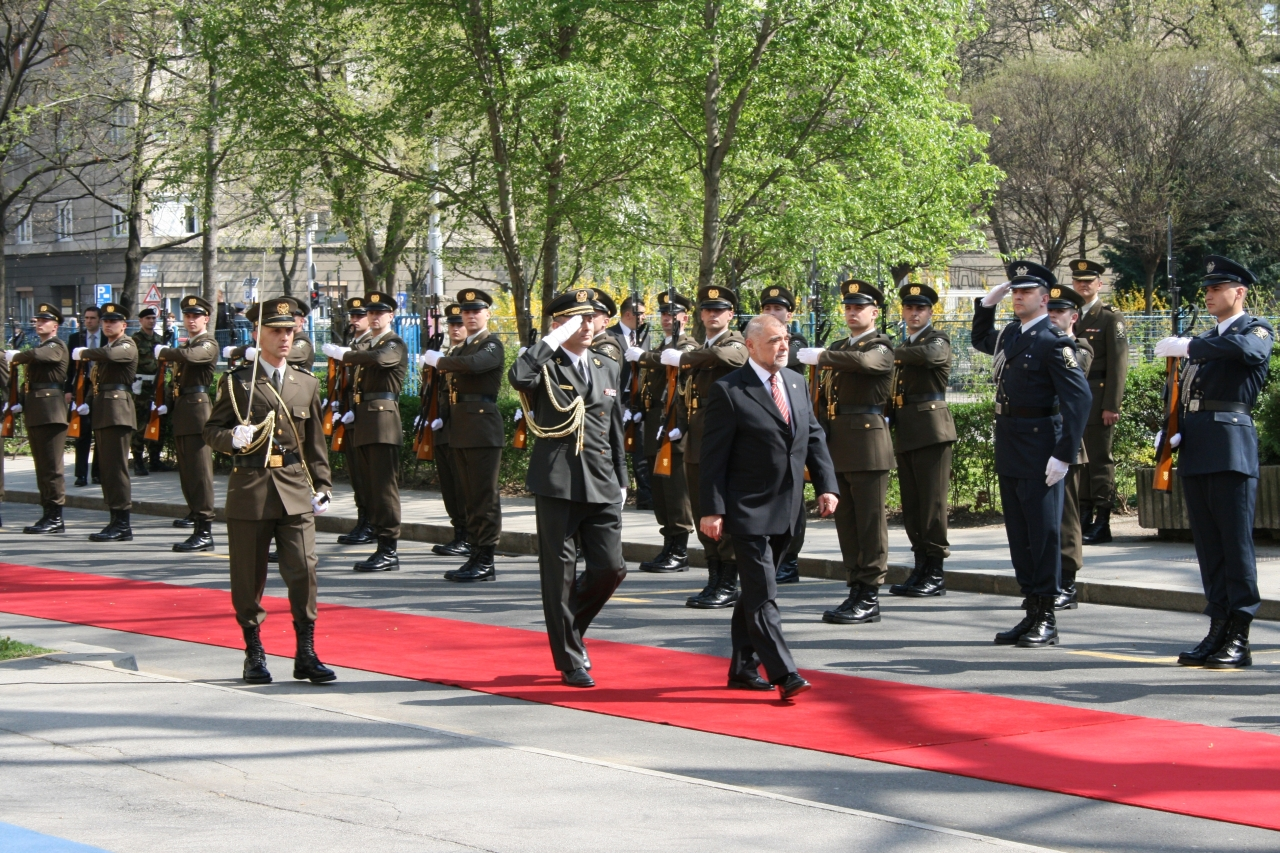 Svečanost podizanja NATO-ve zastave ispred zgrade MORH-a u Zagrebu.